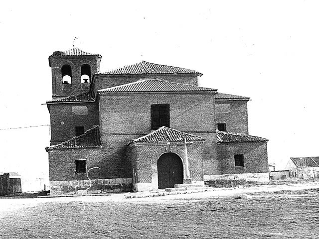 Iglesia de San Miguel Arcángel - Hornillos de Eresma (Valladolid) - Según la tradición aquí reposó el cadáver de Felipe el Hermoso trasladado por la reina doña Juana. - Fotografía. Papel 118 x 88 B/N